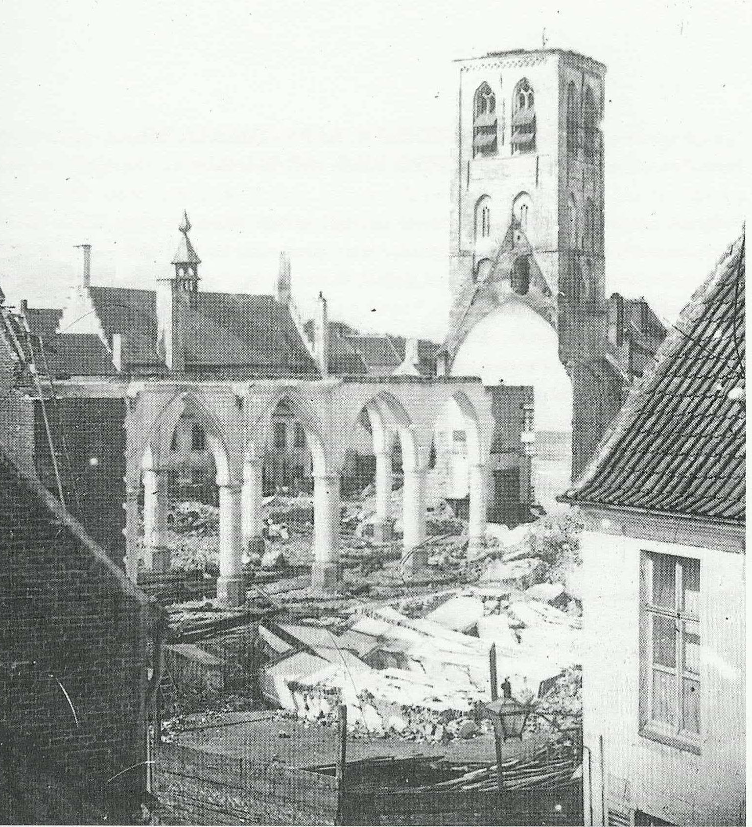 Eeklo - oude kerk - afgebroken in 1878 - Kerk stond op dezelfde plaats als de huidige kerk. Bemerk het stadhuis achter de kerk.Je ziet dus dat de foto genomen is vanuit de Kerkstraat-hoek Kerkplein.